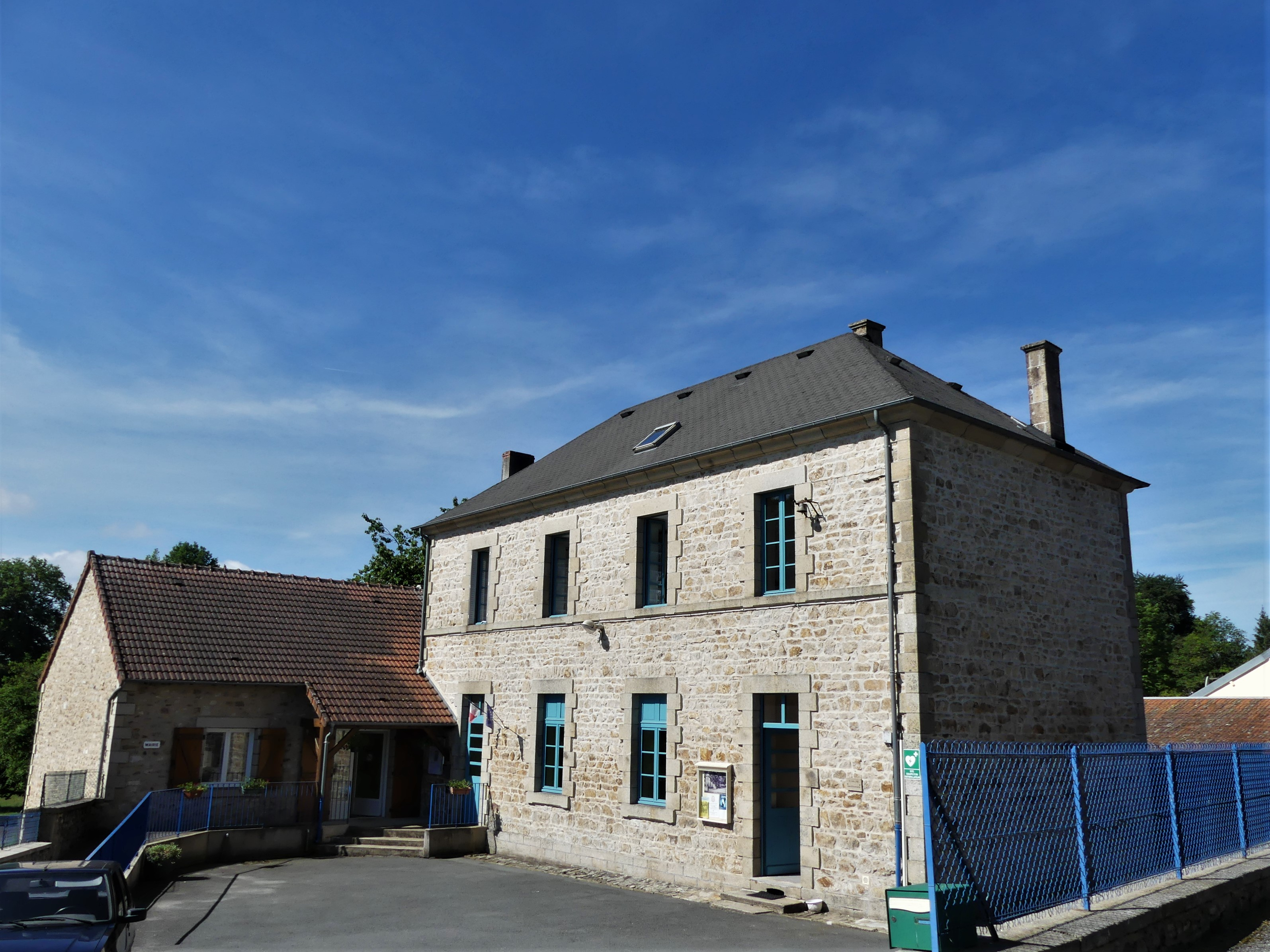 La mairie de Saint-Marc-à-Loubaud, Creuse, France.